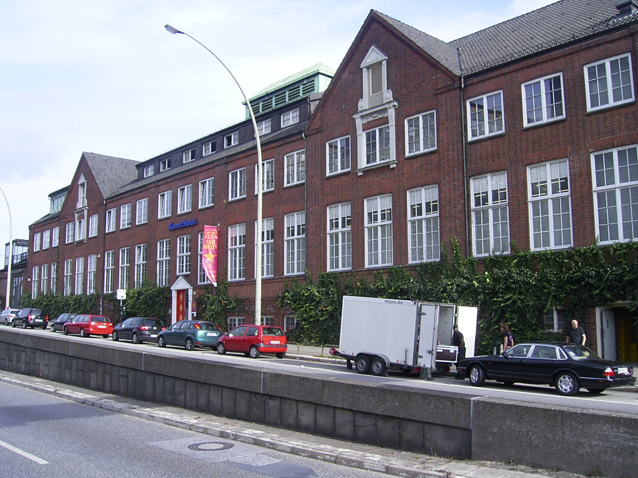 Das Kunsthaus in der ehemaligen Blumenhalle des Großmarktes in Klostertor